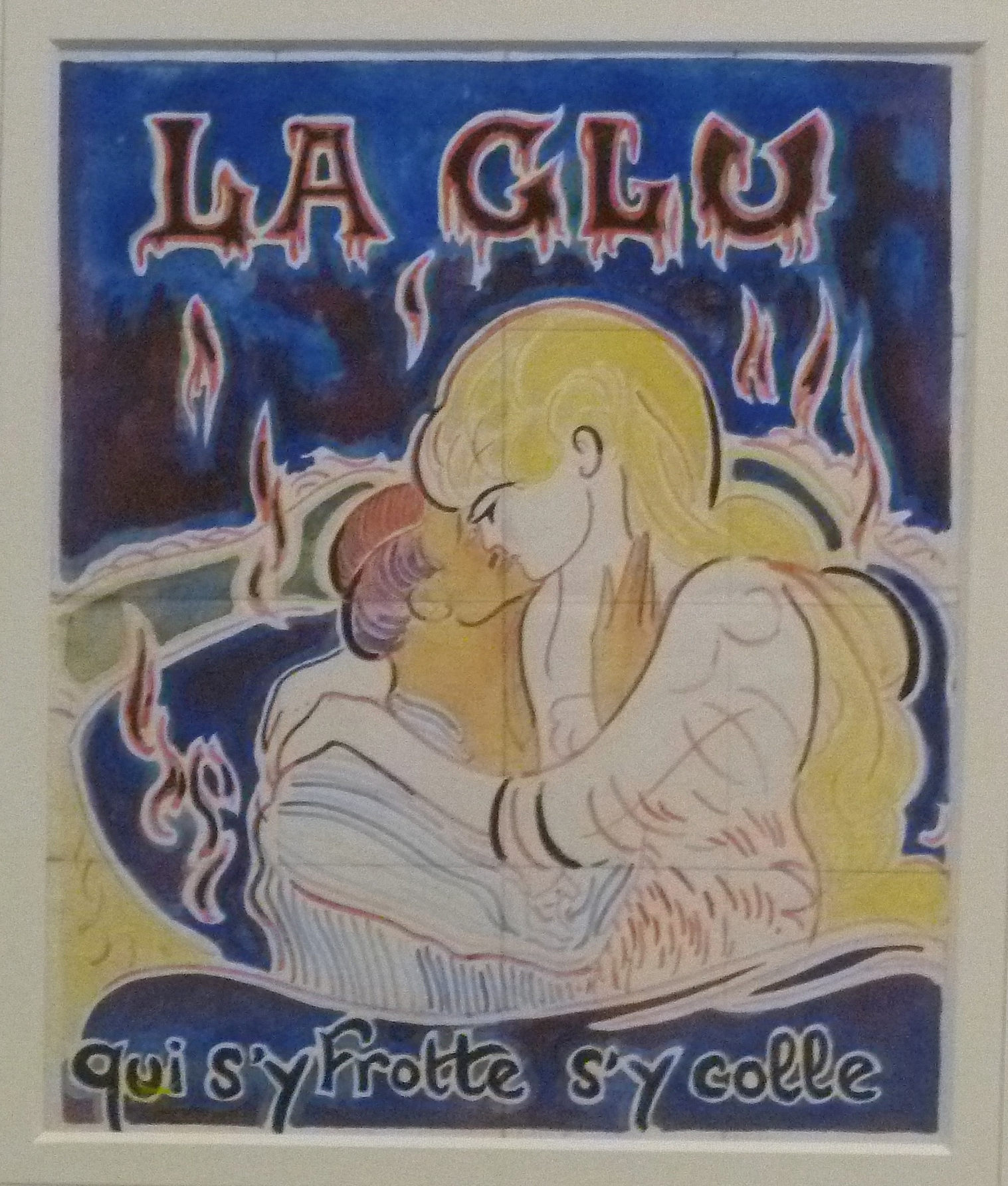 "La Glu" door Jean Richepin- niet-uitgevoerd afficheontwerp door Léon Spilliaert (1917); potlood en aquarel op ppaier (188 x 154 mm); privéverzameling